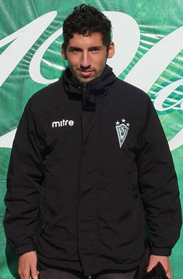 Edición de la fotografía "RobertoSaldías.jpg", que muestra al jugador de fútbol Roberto Saldías.